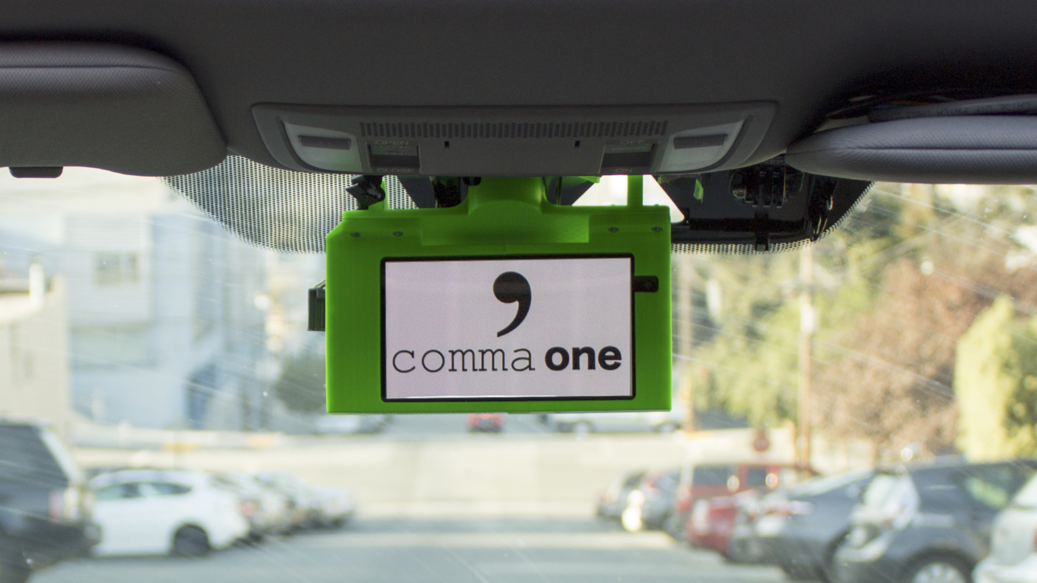 Comma-one